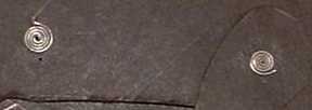 Techniek spiraalverbinding.